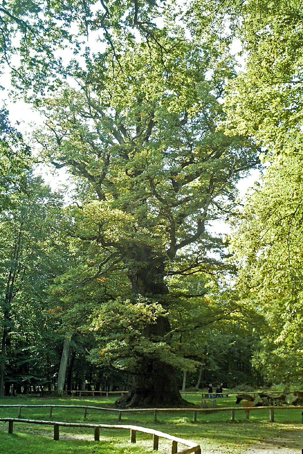 Die älteste Eiche im Ivenacker Tiergarten